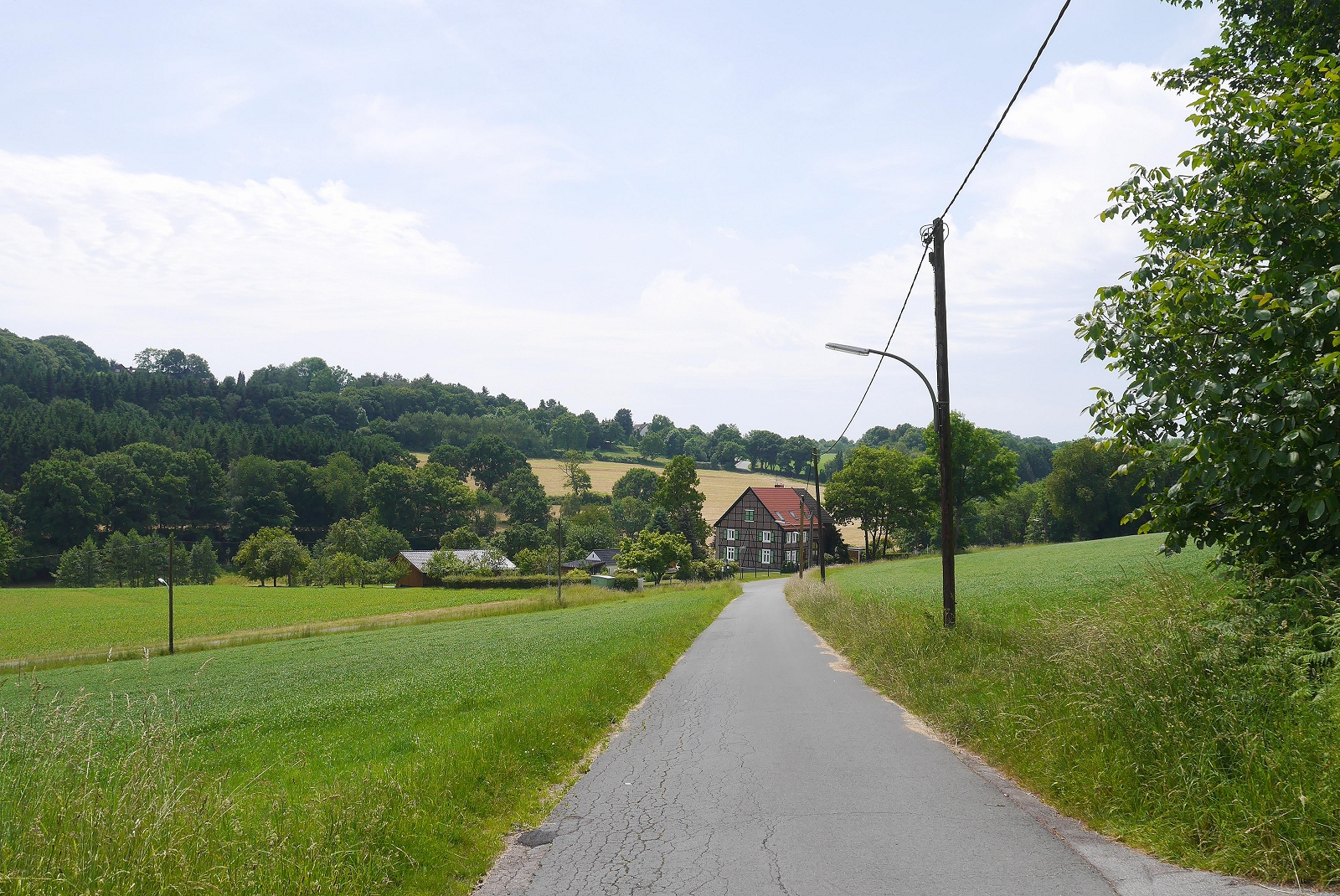 Blick entlang der Irminsulstraße in Dortmund-Syburg (Nähe Golfplatz Dortmund); in der Bildmitte das denkmalgeschützte Fachwerkhaus Wannestraße 40, der Talraum dahinter gehört zum NSG „Wannebachtal und Fürstenbergholz“ This is a photograph of an architectural monument. 1018